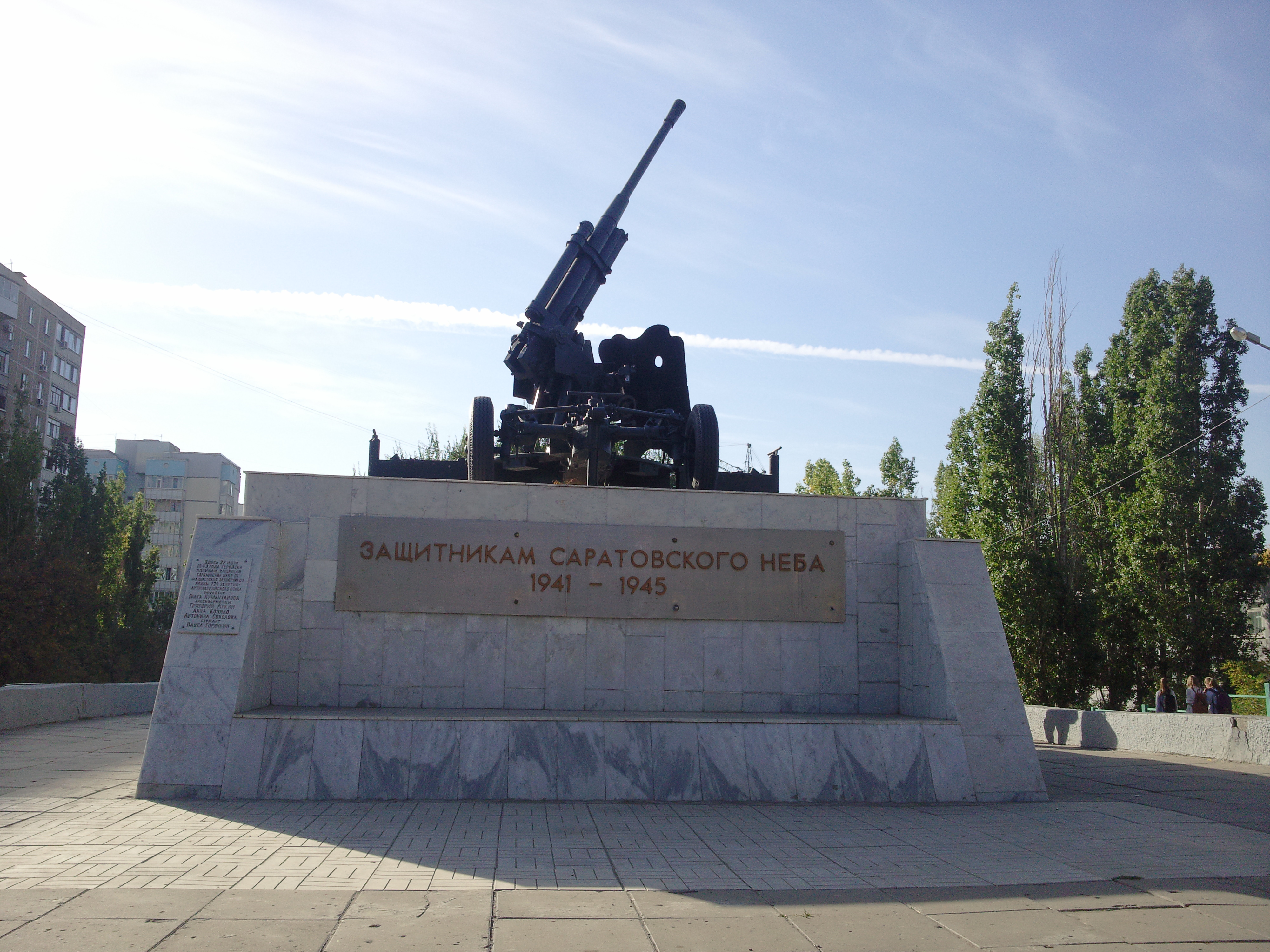 Памятник 'Защитникам саратовского неба', установленный на месте батареи 720-го зенит-артиллерийского полка: улица Чернышевского, 4, Саратов, Саратовская область